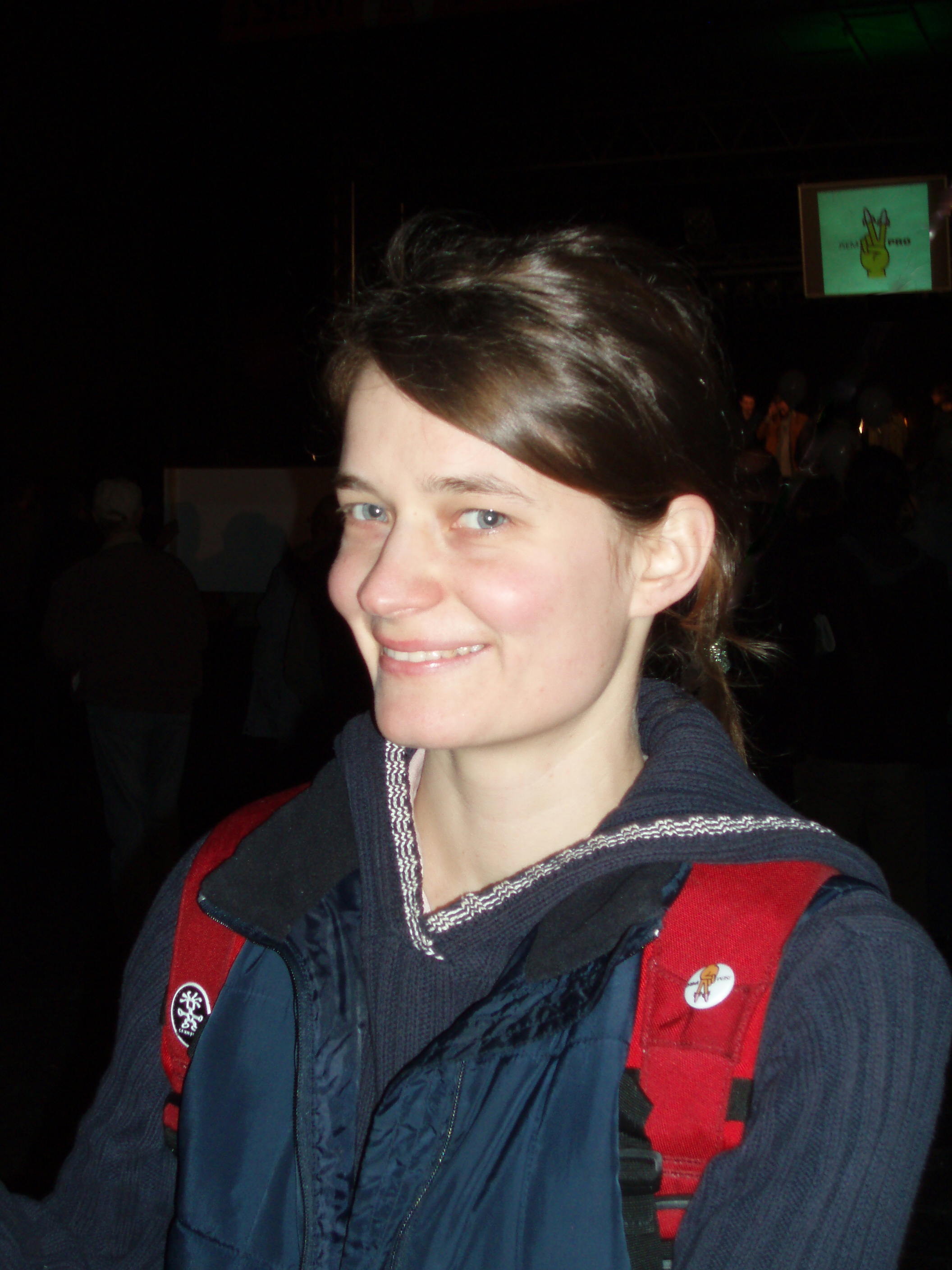 Petra Hůlová v roce 2007